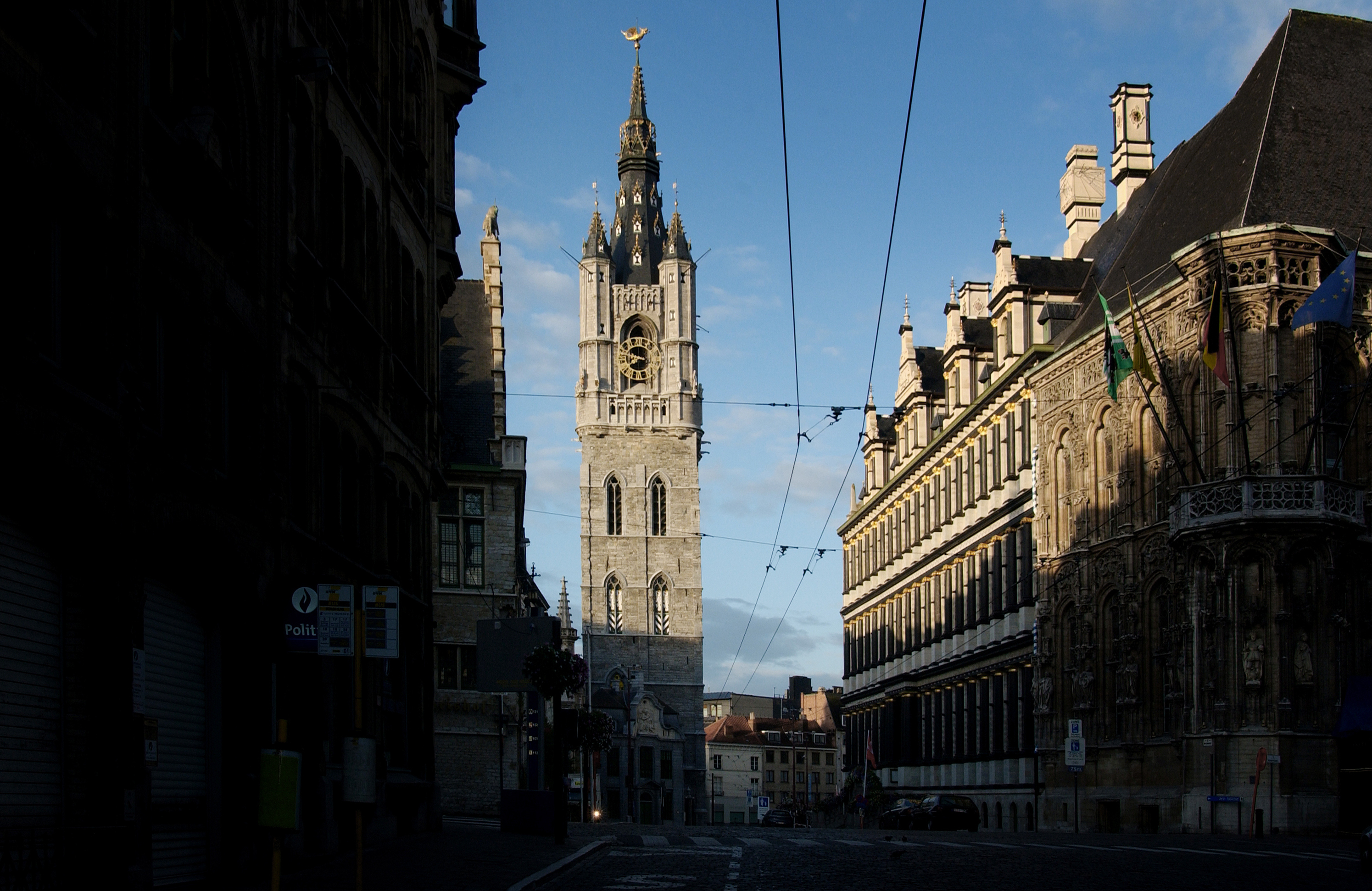 Het Gentse Belfort en Stadhuis in ochtendlicht.